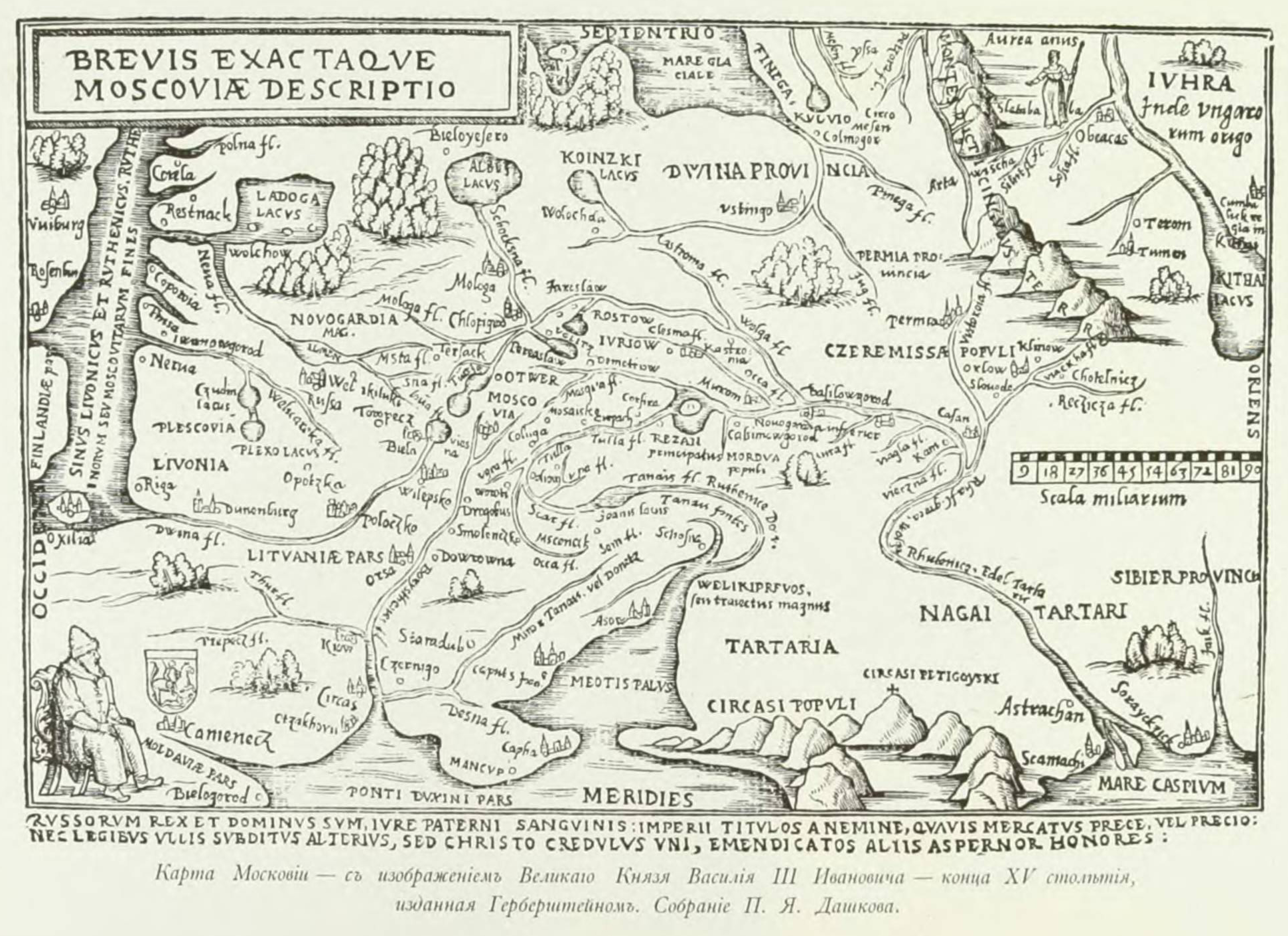 Великокняжеская, царская и императорская охота на Руси